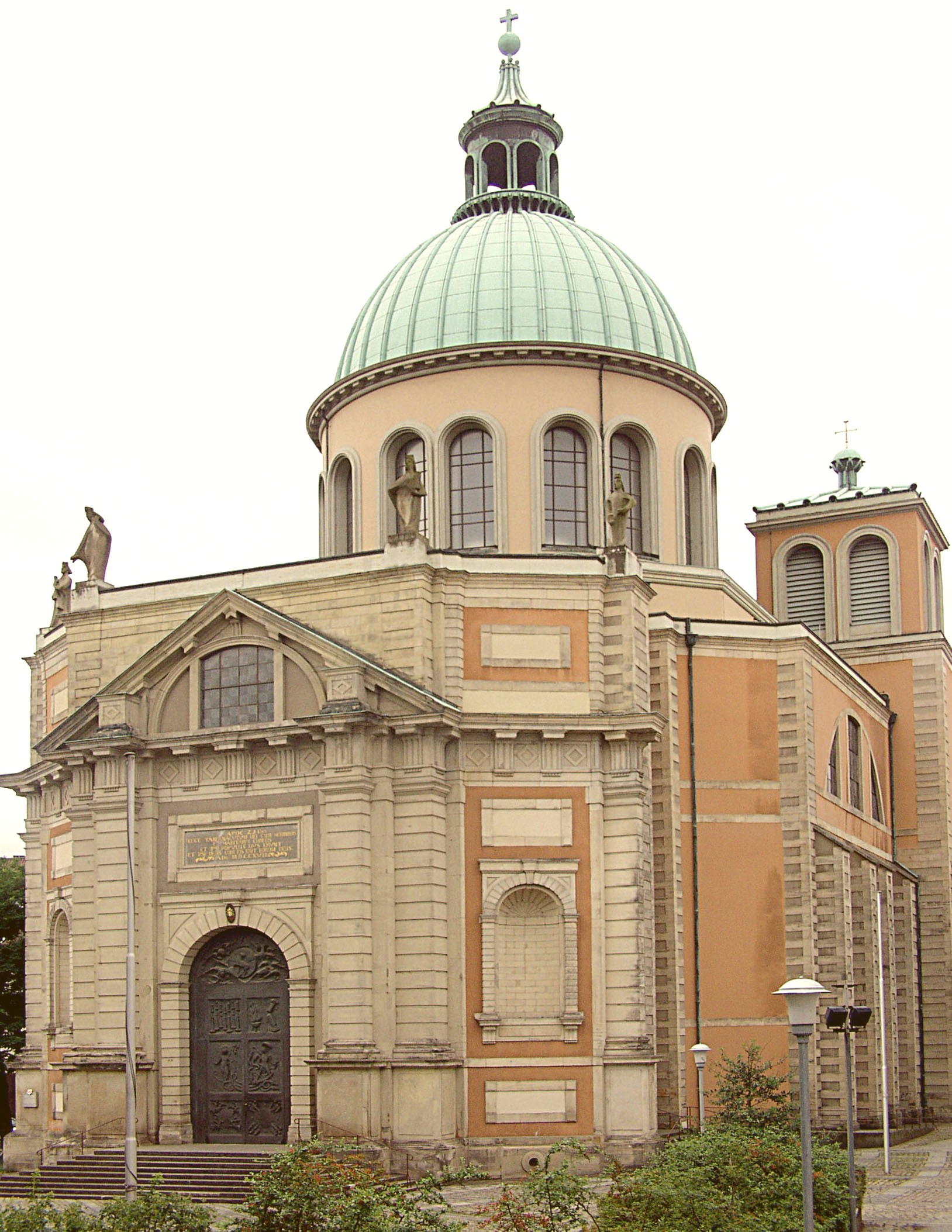 Aussenansicht. Kuppel der Basilika St. Clemens in Hannover, Niedersachsen, Deutschland